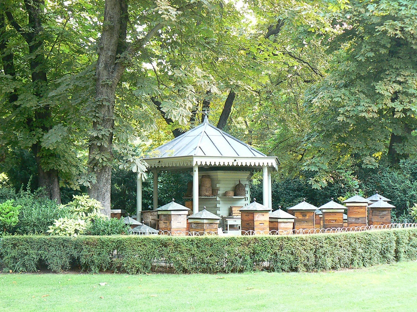 Le rucher-école du Jardin du Luxembourg où sont dispensés les cours pratiques de la Société Centrale d'Apiculture, VIe arrondissement, Paris, France. Auteur : Olivier Perrin Site